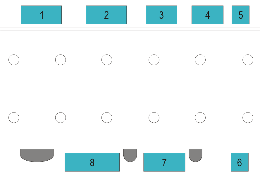 Scuola Grande di San Rocco in Venice, Ground Floor Hall